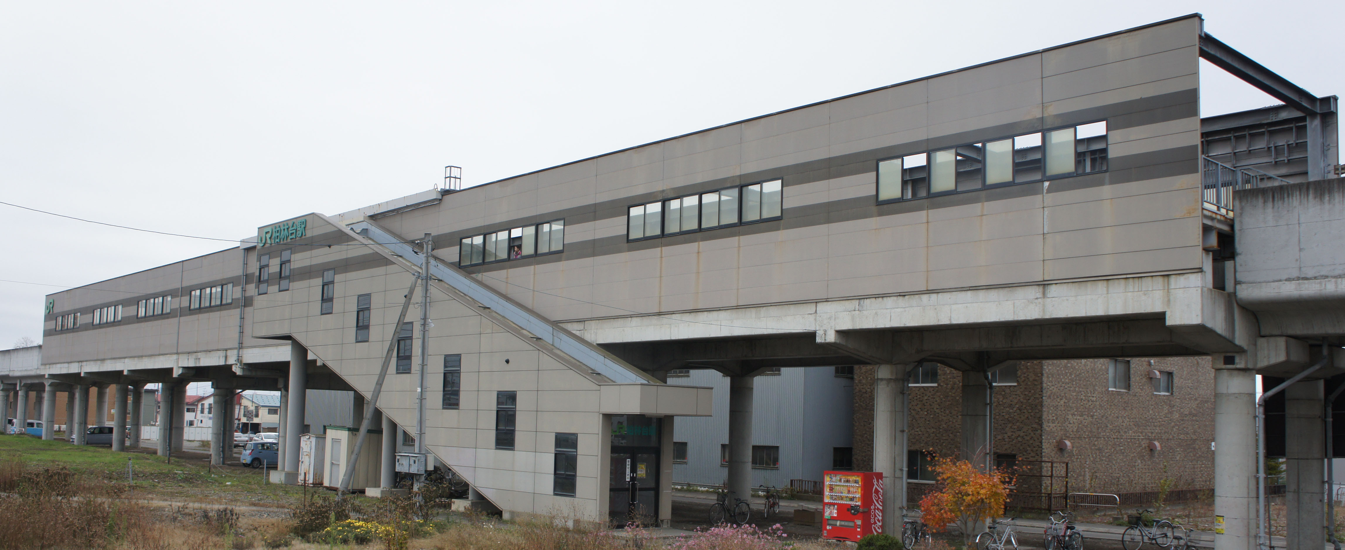 JR根室本線・柏林台駅全景 Sony NEX-3